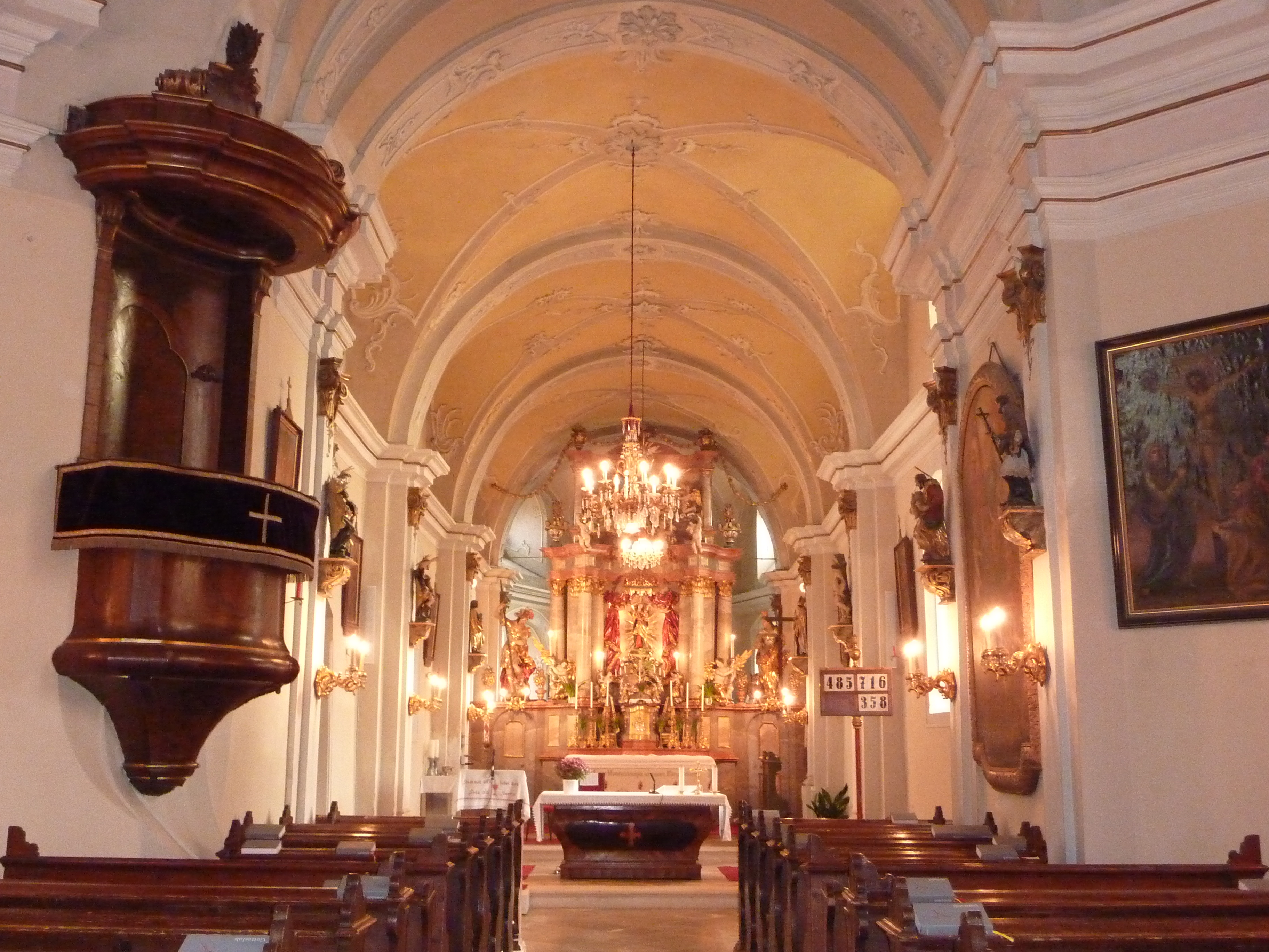 Pfarrkirche Mariae Heimsuchung, Zemling, Hohenwarth-Mühlbach am Manhartsberg, Niederösterreich